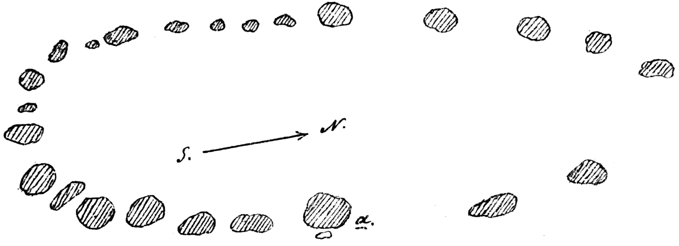 Plan över tingsstället i Nässja i Östergötland. Teckning i "Utdrag af Antiqvitets-Intendenten P. A. Säves afgifna berättelse för år 1861", publicerad i Antiqvarisk tidskrift för Sverige band 1, 1864.